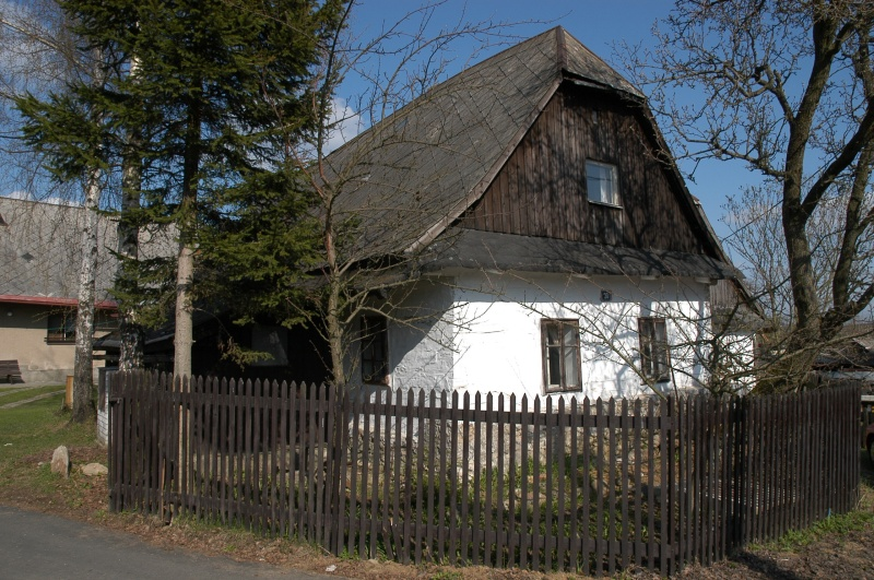 Rodný dům malíře Jambora v Pohledci